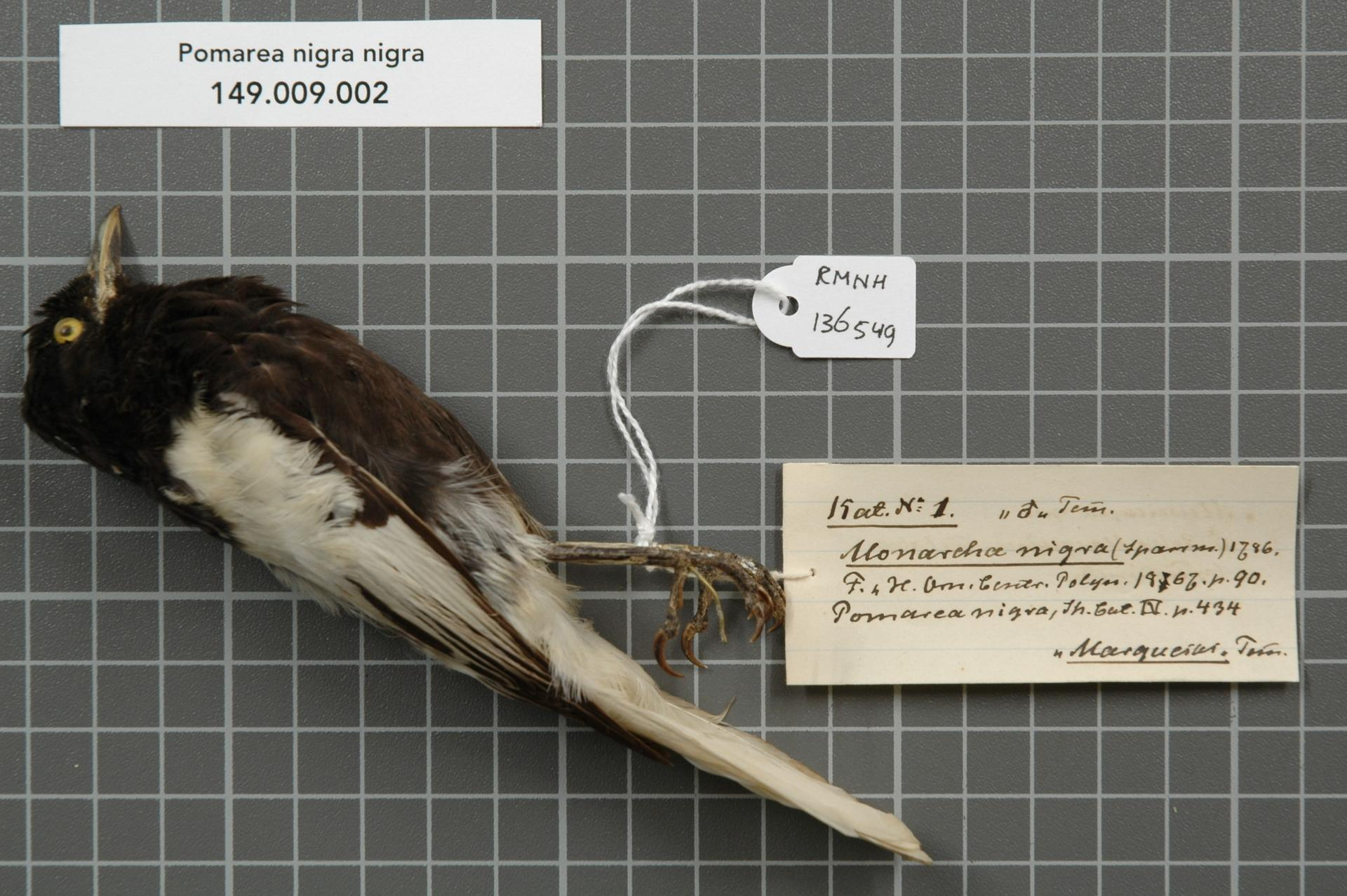 Pomarea nigra nigra (Sparrman, 1786)